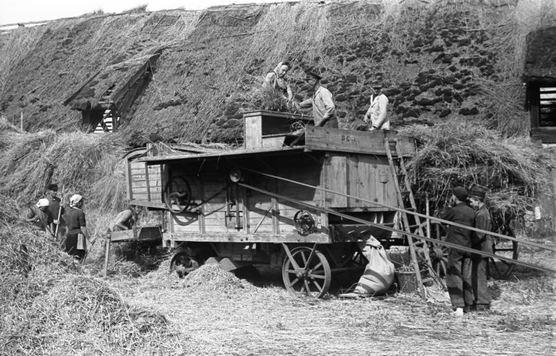 Dahlwitz, Dreschen des Getreides ADN-ZB/Blunck/ Roggenernte 1948 in Dahlwitz Bez. Frankfurt/Oder. Bauern beim Dreschen des Getreides.